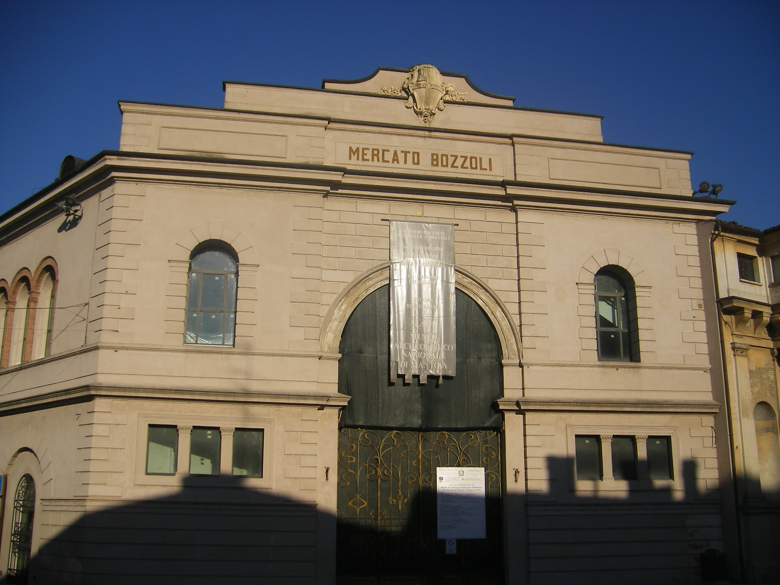 Mercato Bozzoli a Mantova